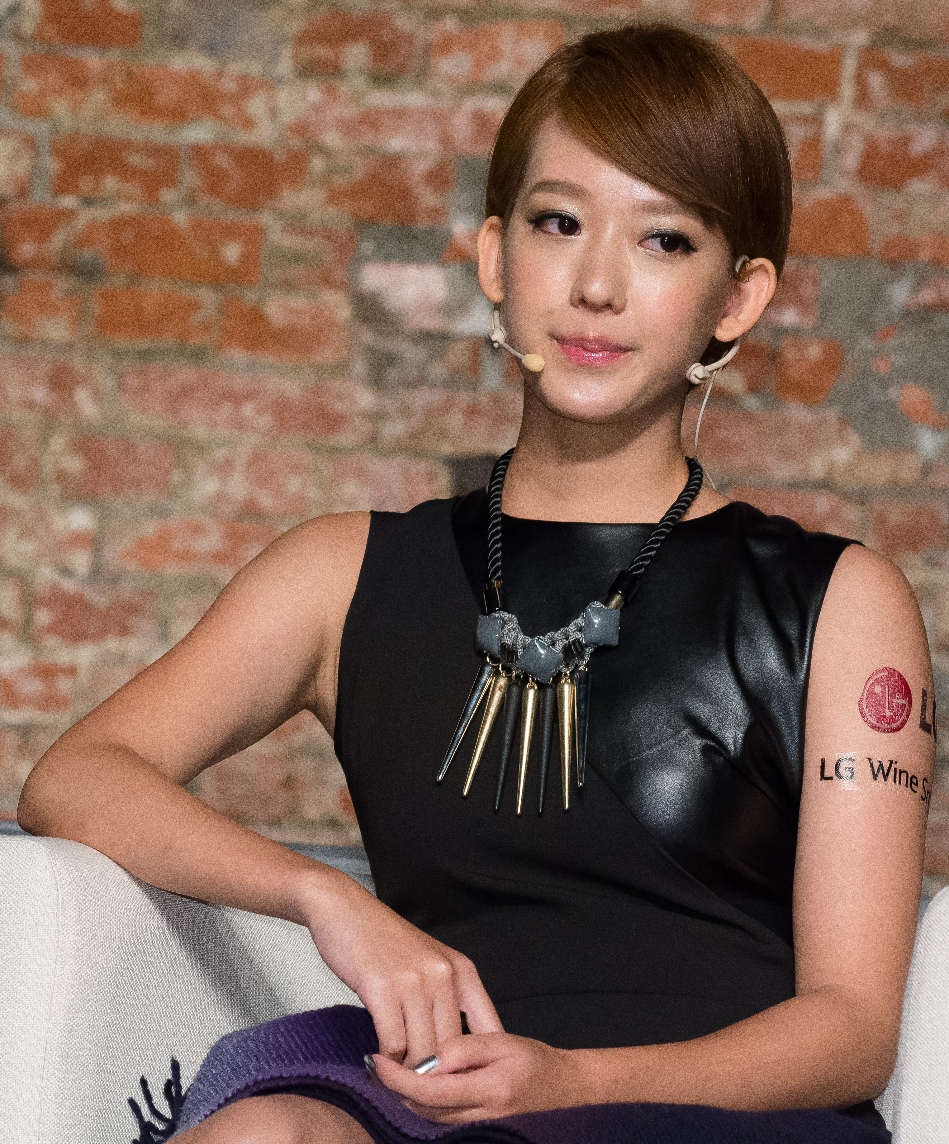 臺灣女演員孟耿如。